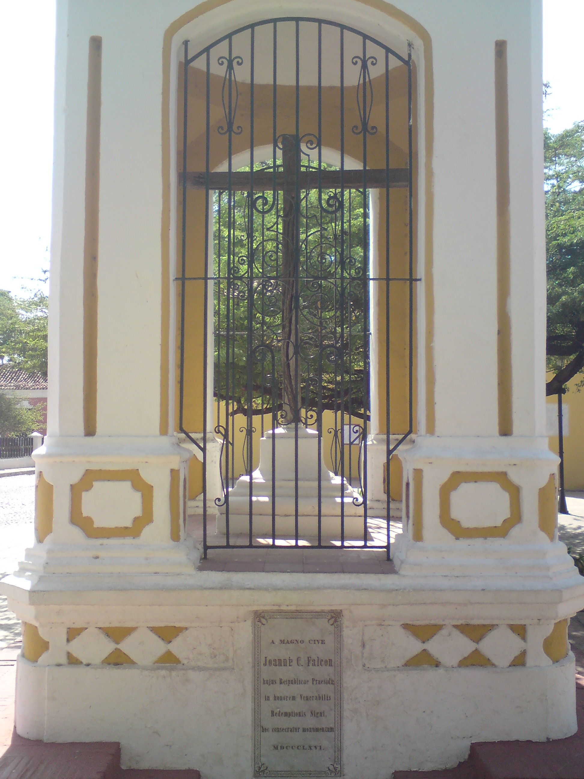 Cruz de San Clemente. Coro, Estado Falcón.